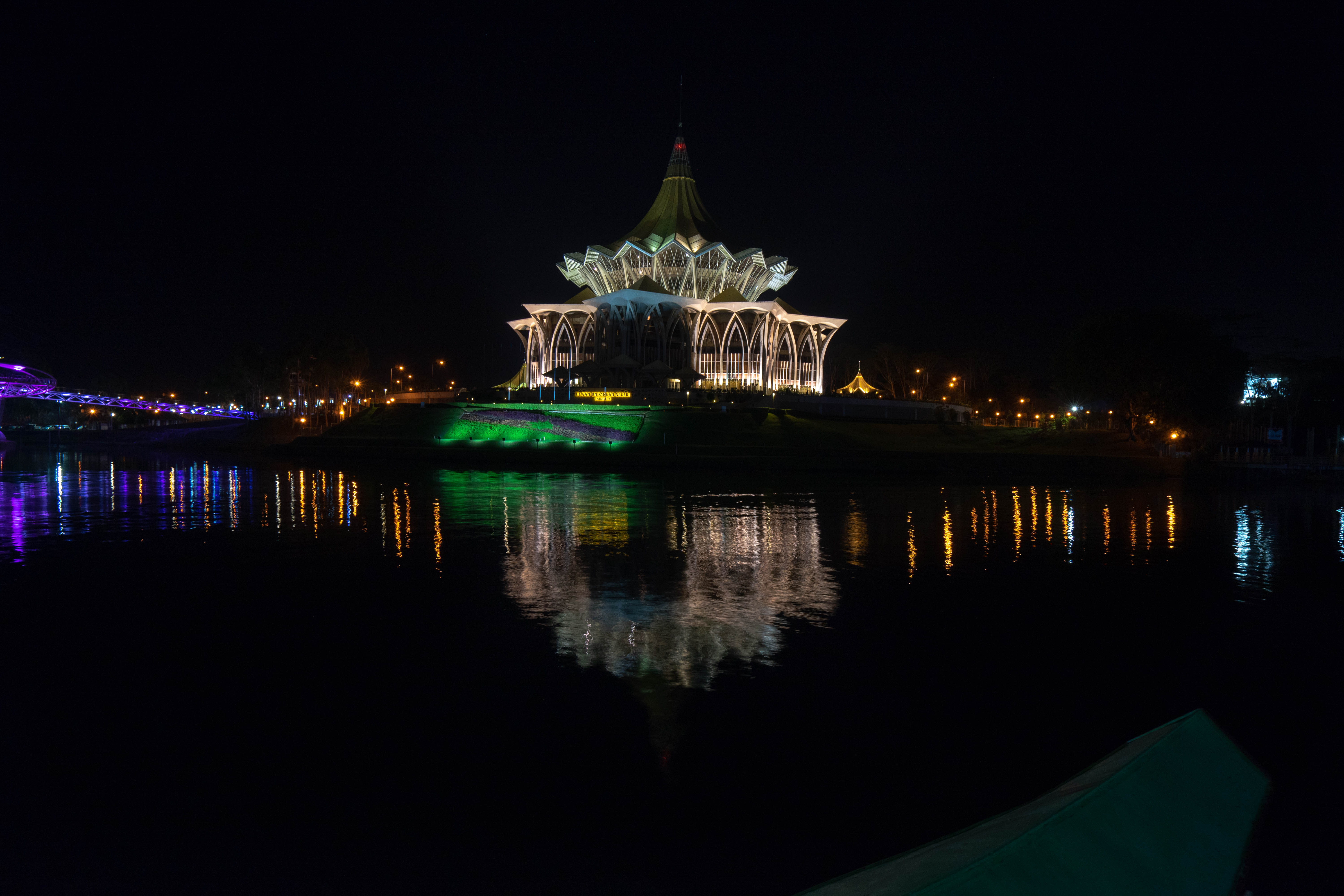 Bangunan DUN Sarawak 2018